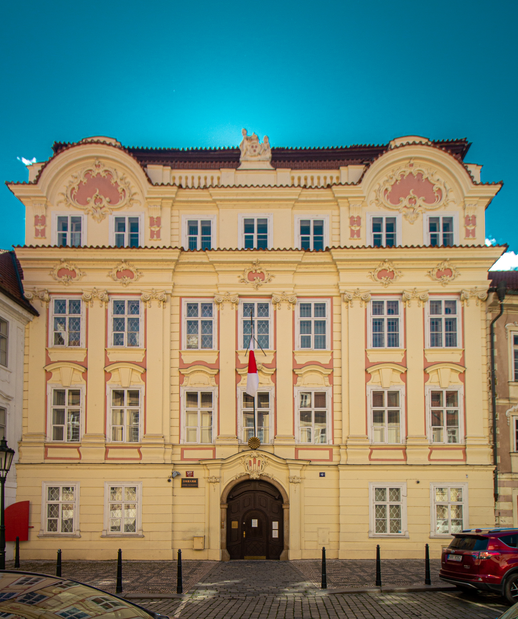 Palác Turbů, Malá Strana